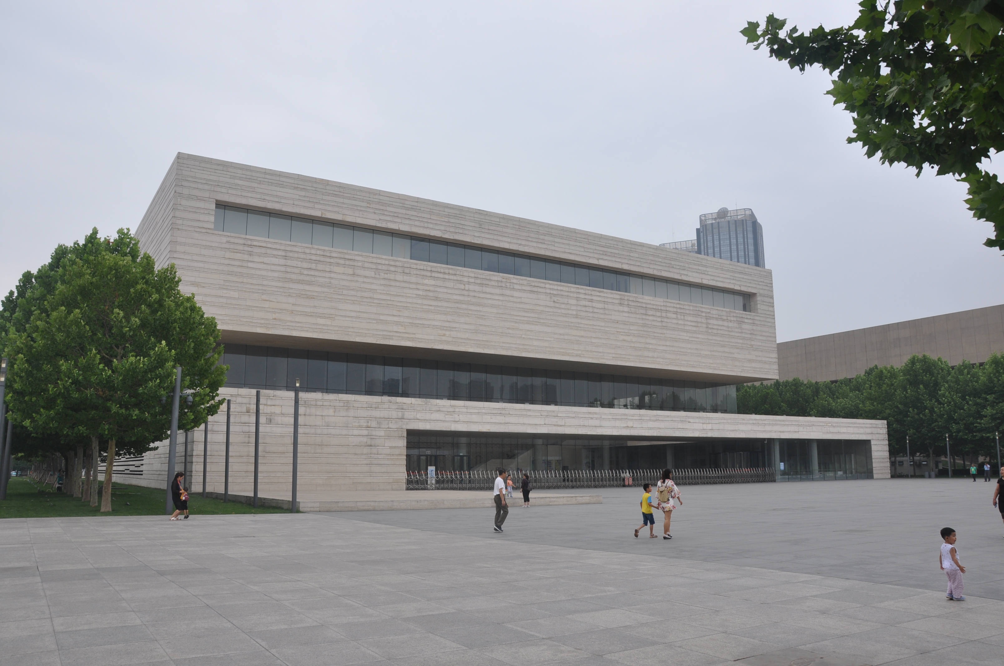 中文（中国大陆）: 天津美术馆外景